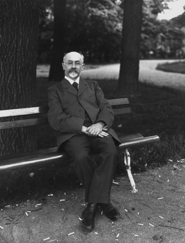 Михаил Яковлевич Герценштейн, депутат Государственной Думы от Московской губернии